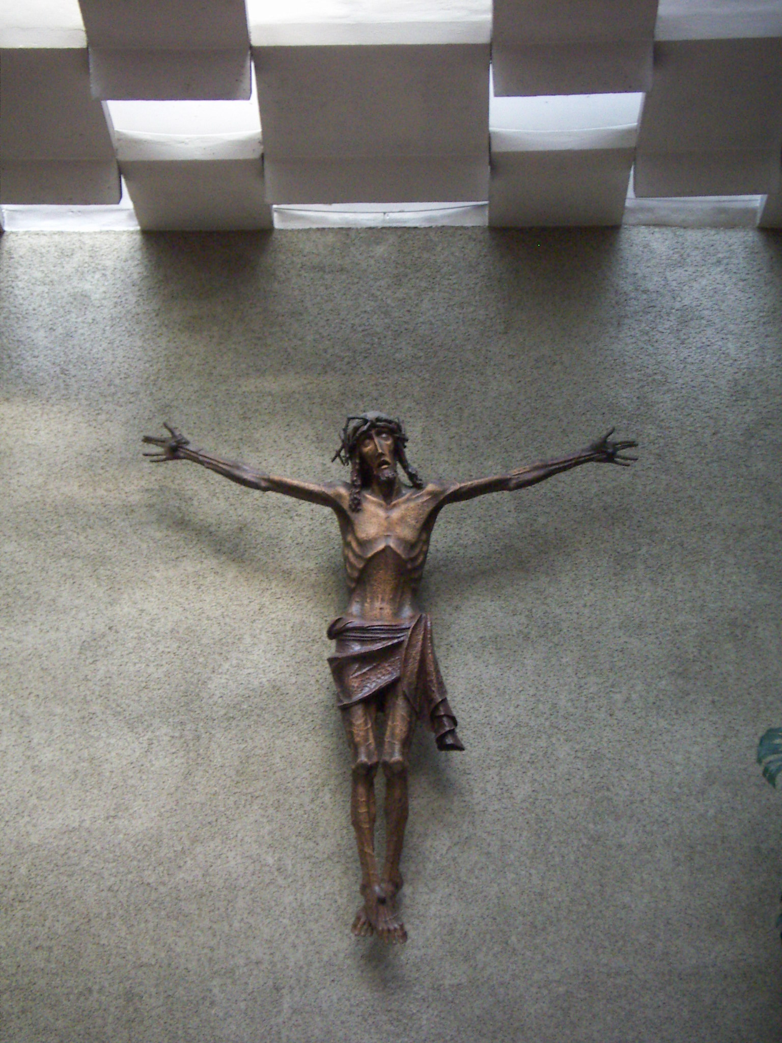 Pfarrkirche Am Tabor (Leopoldstadt), Kruzifix des Bildschnitzers Peter Sellemond Peter Sellemond (1884–1942) DescriptionAustrian sculptorDate of birth/death 14 January 1884 16 November 1942Location of birth/death Feldthurns Hall in TirolAuthority control : Q2078297 VIAF: 300131737 ISNI: 0000 0004 0341 0451 GND: 1033734608 creator QS:P170,Q2078297